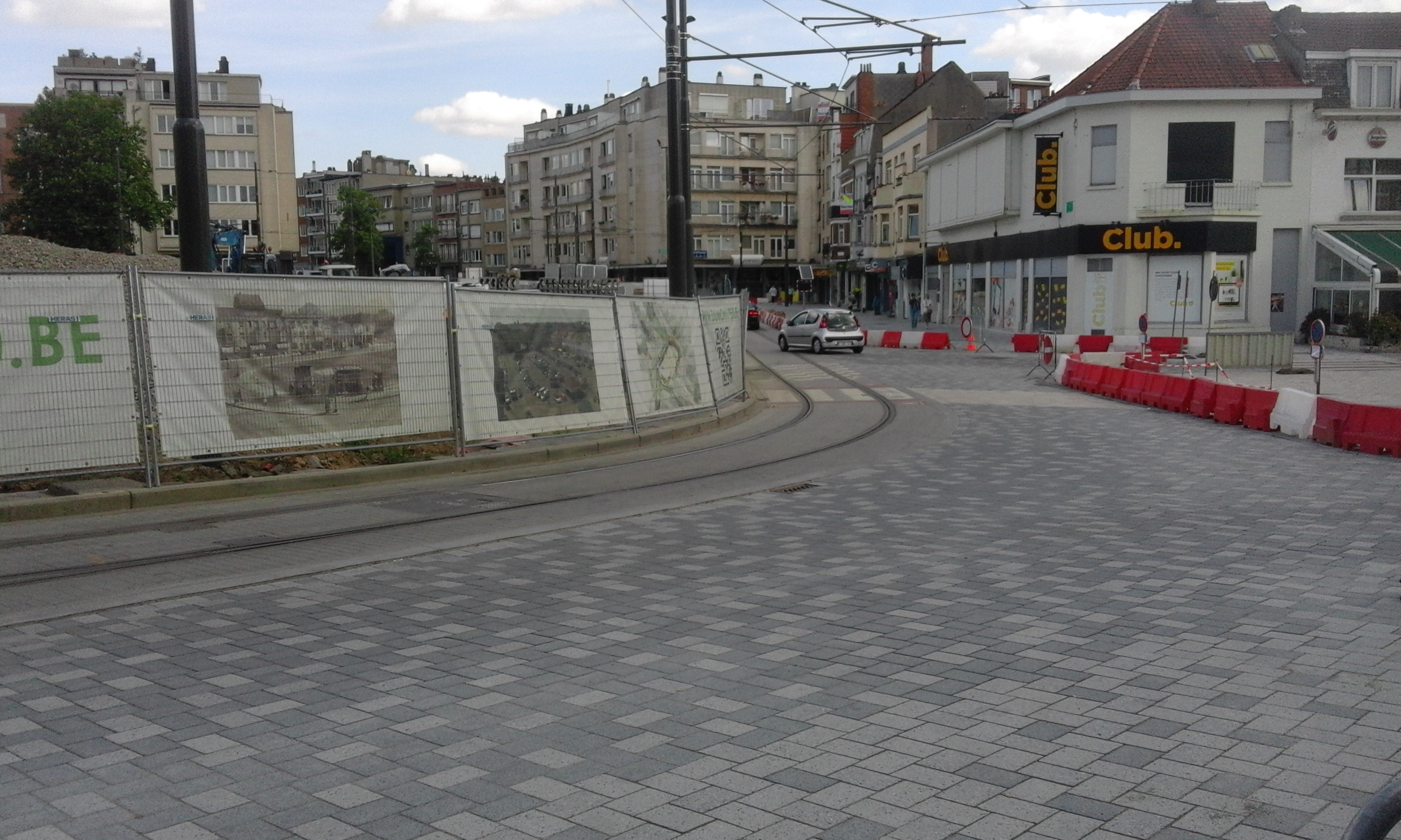 Travaux de réaménagement de la Place Dumon, à Woluwe-Saint-Pierre, en Région de Bruxelles-Capitale, Belgique, en 2017